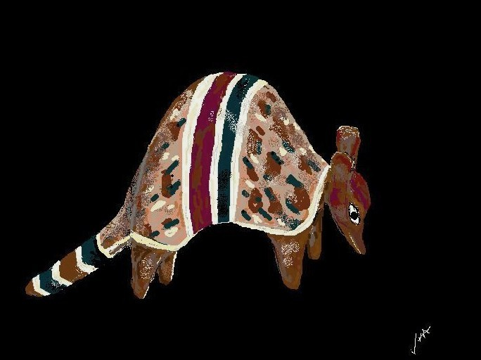 Paint